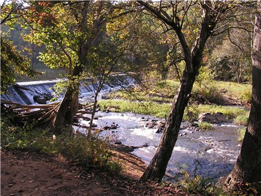 Eno rivier eigen foto